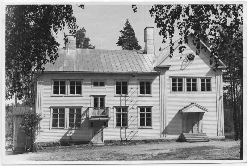 Mathildedalin kansakoulu